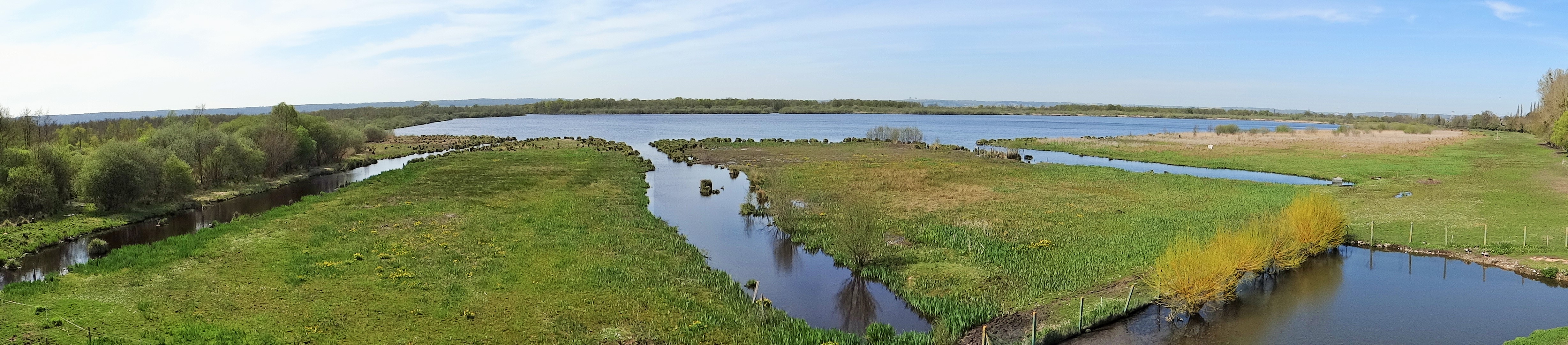 Réserve naturelle nationale du marais Vernier, vue panoramique